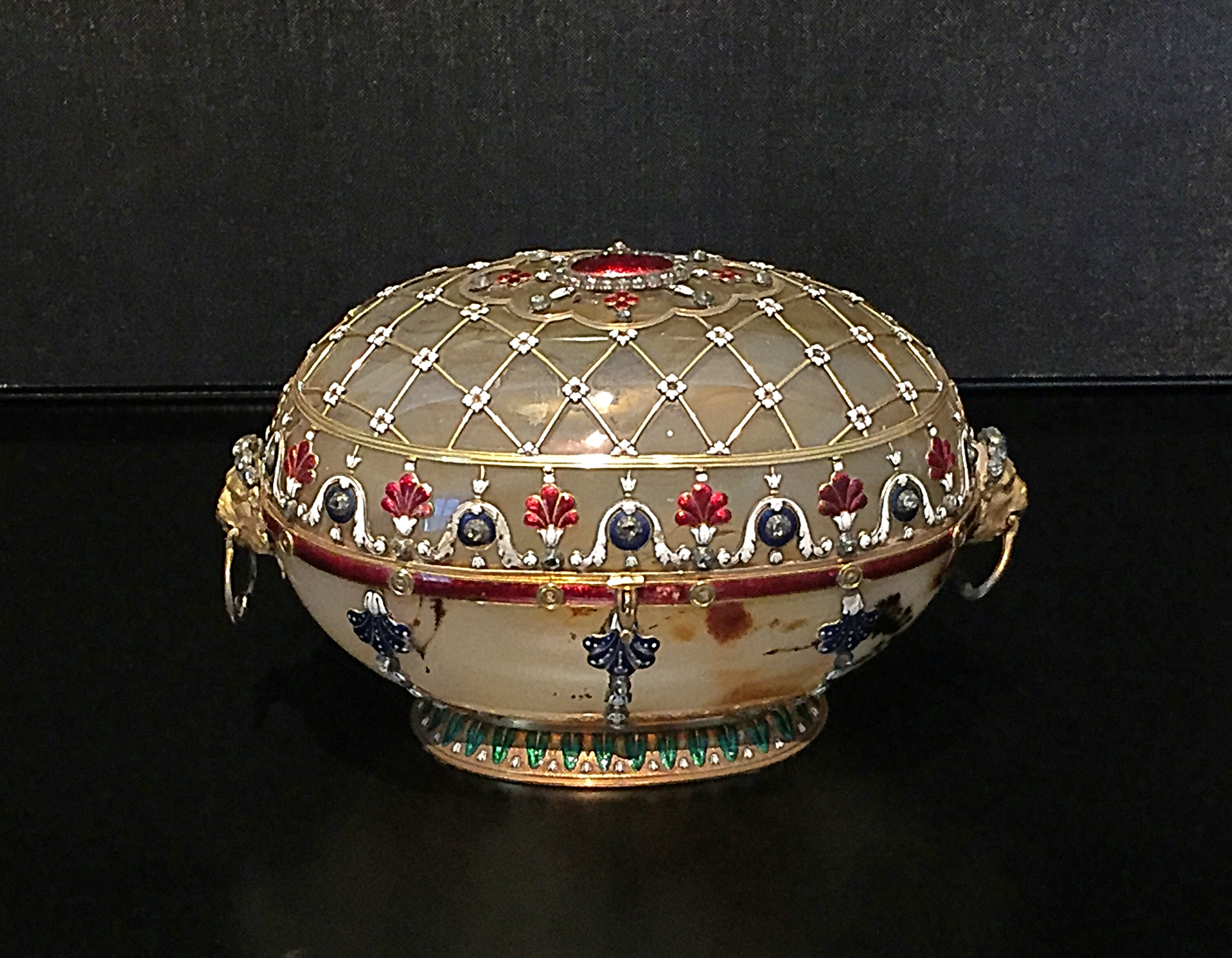 Шкатулка Ле Роя (18 век, собрание Грюнес Гевёльбе, Дрезден)